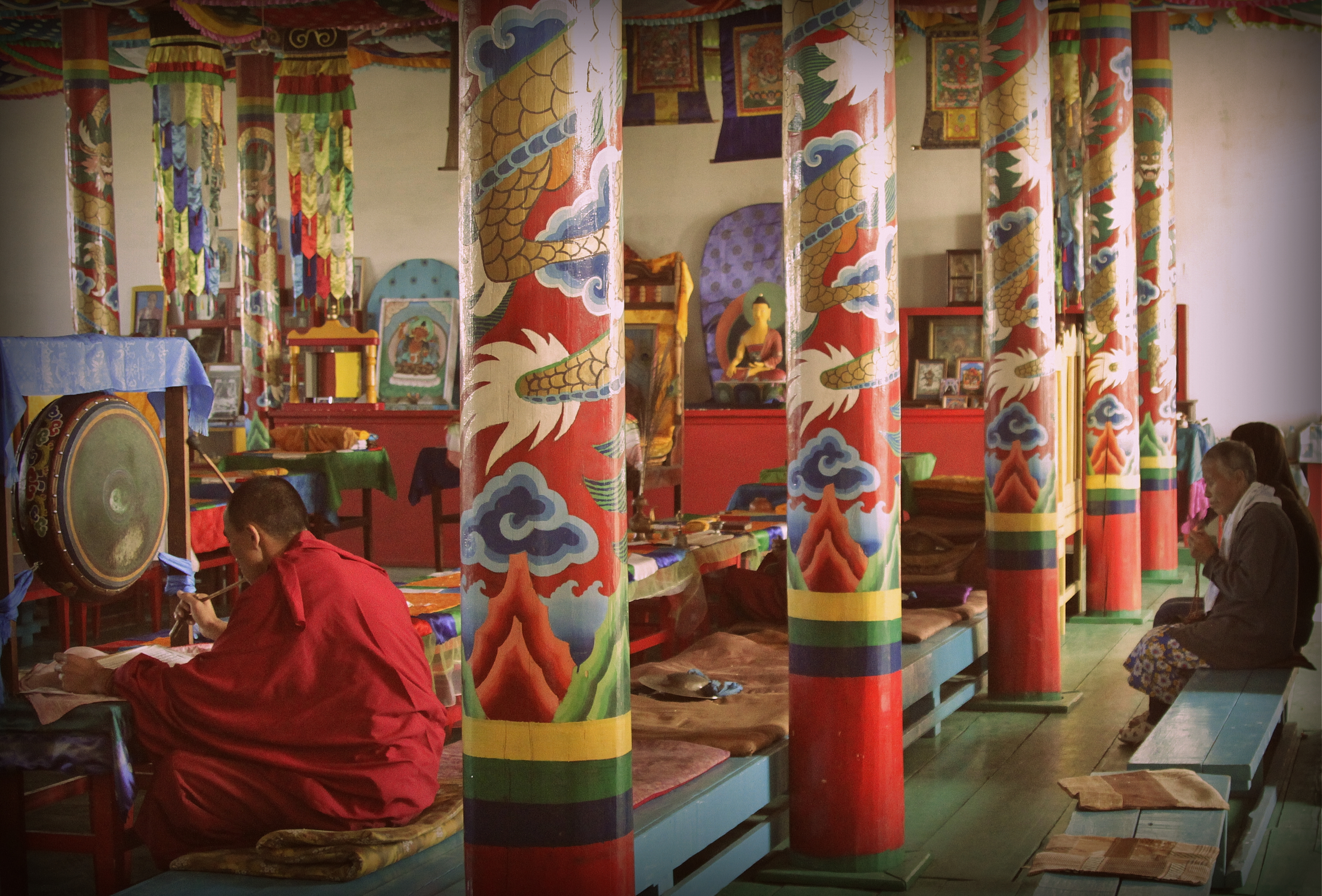 Молебен в Атаган-Дырестуйском дацане. Джидинский район, Бурятия